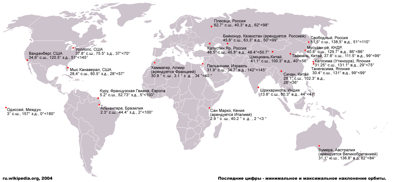 Автор: Илья Харламов (Yadra). Изображение помещено на условиях лицензии GNU FDL. Это изображение PNG в расширенном формате PNG и содержит слои. Прямо этот файл можно редактировать без ущерба в редакторе Macromedia Fireworks.